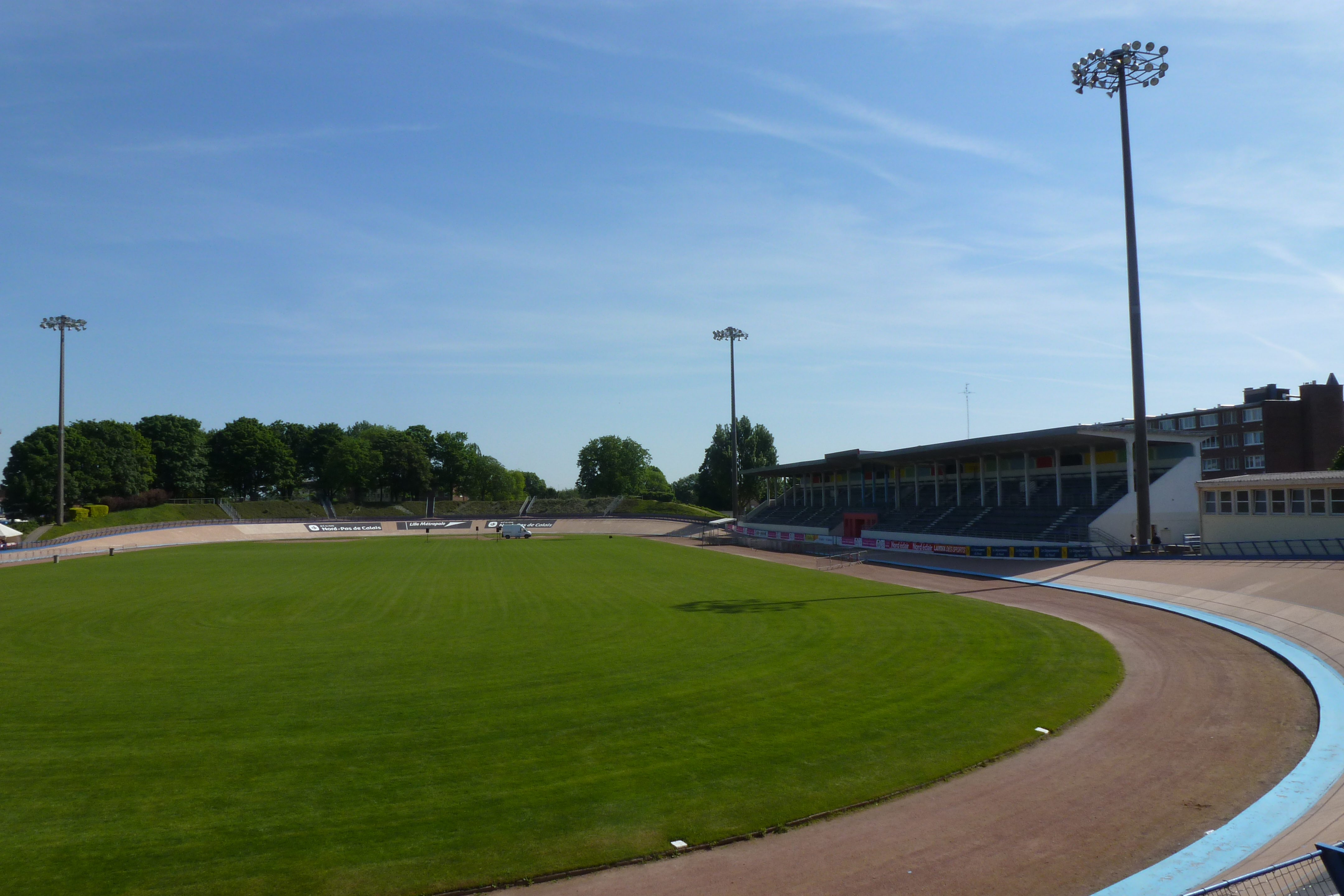 Radrennbahn André Pétrieux in Roubaix